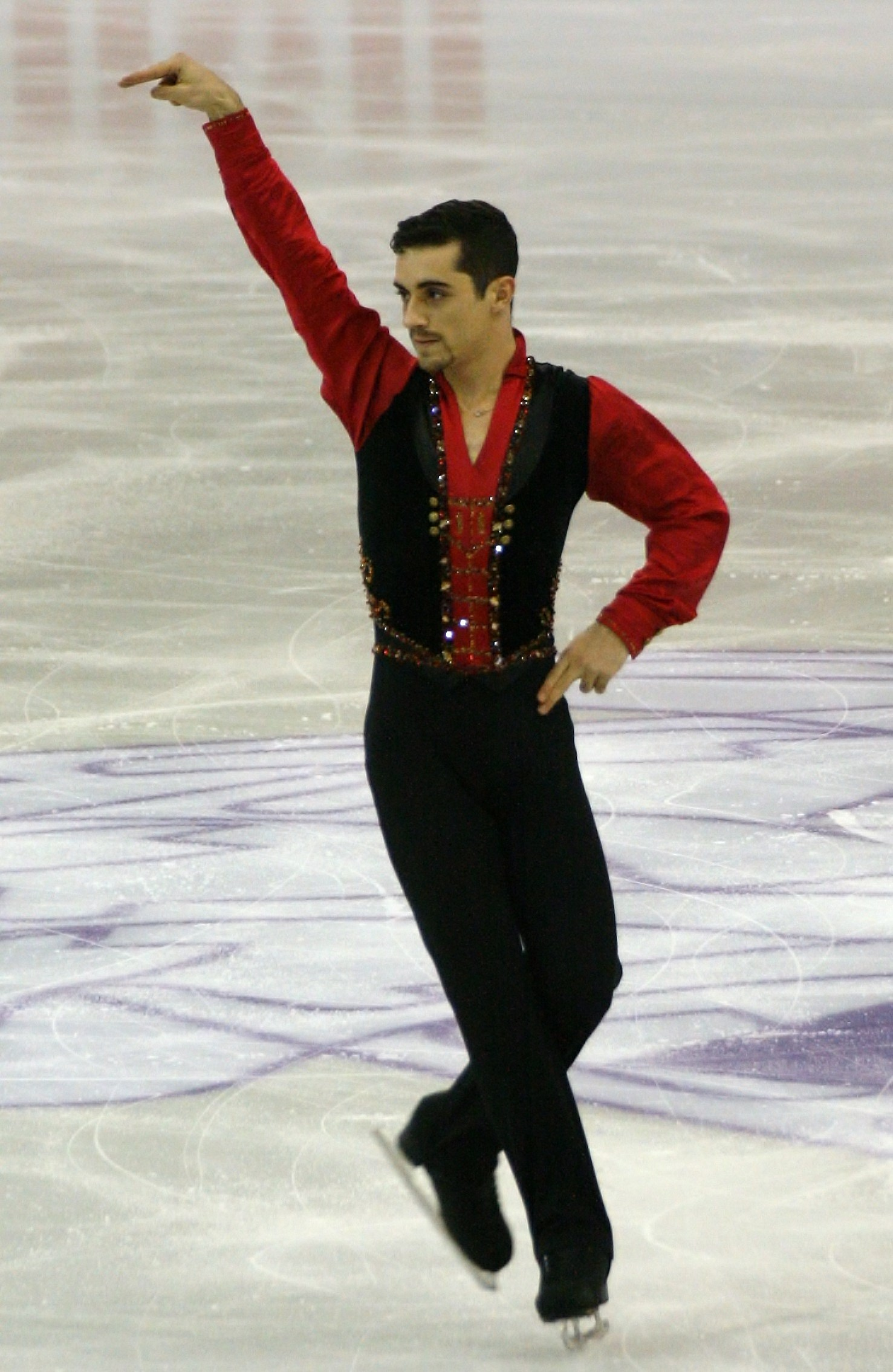 Хавьер Фернандес (Испания) на финале Гран-при по фигурному катанию 2015-2016.